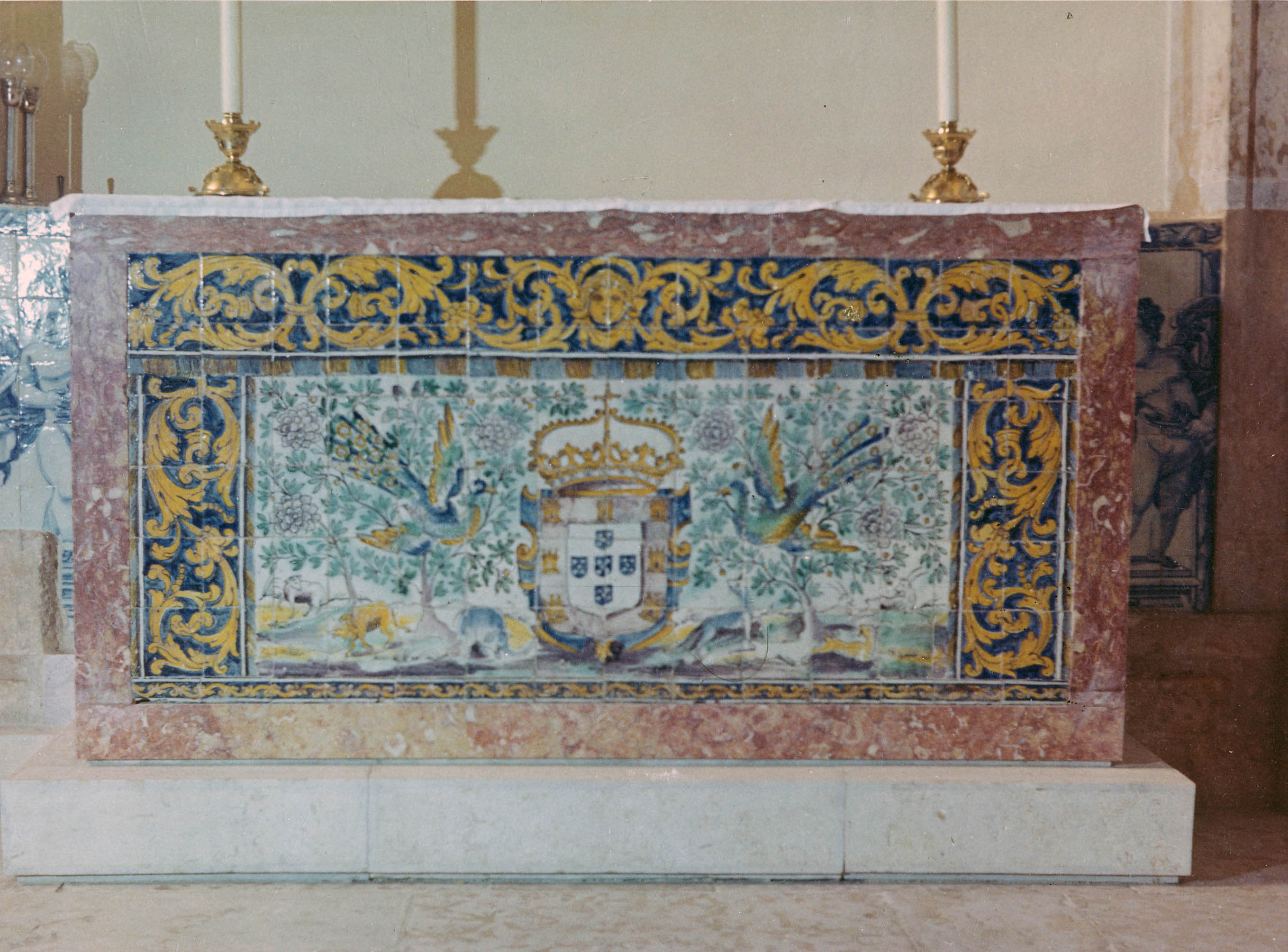 Frontal de altar. Azulejos dos séculos 17-18. Fotógrafo: João Miguel dos Santos Simões (1907-1972). Data de produção da fotografia original: 1960-1970. [CFT009.1084.ic]